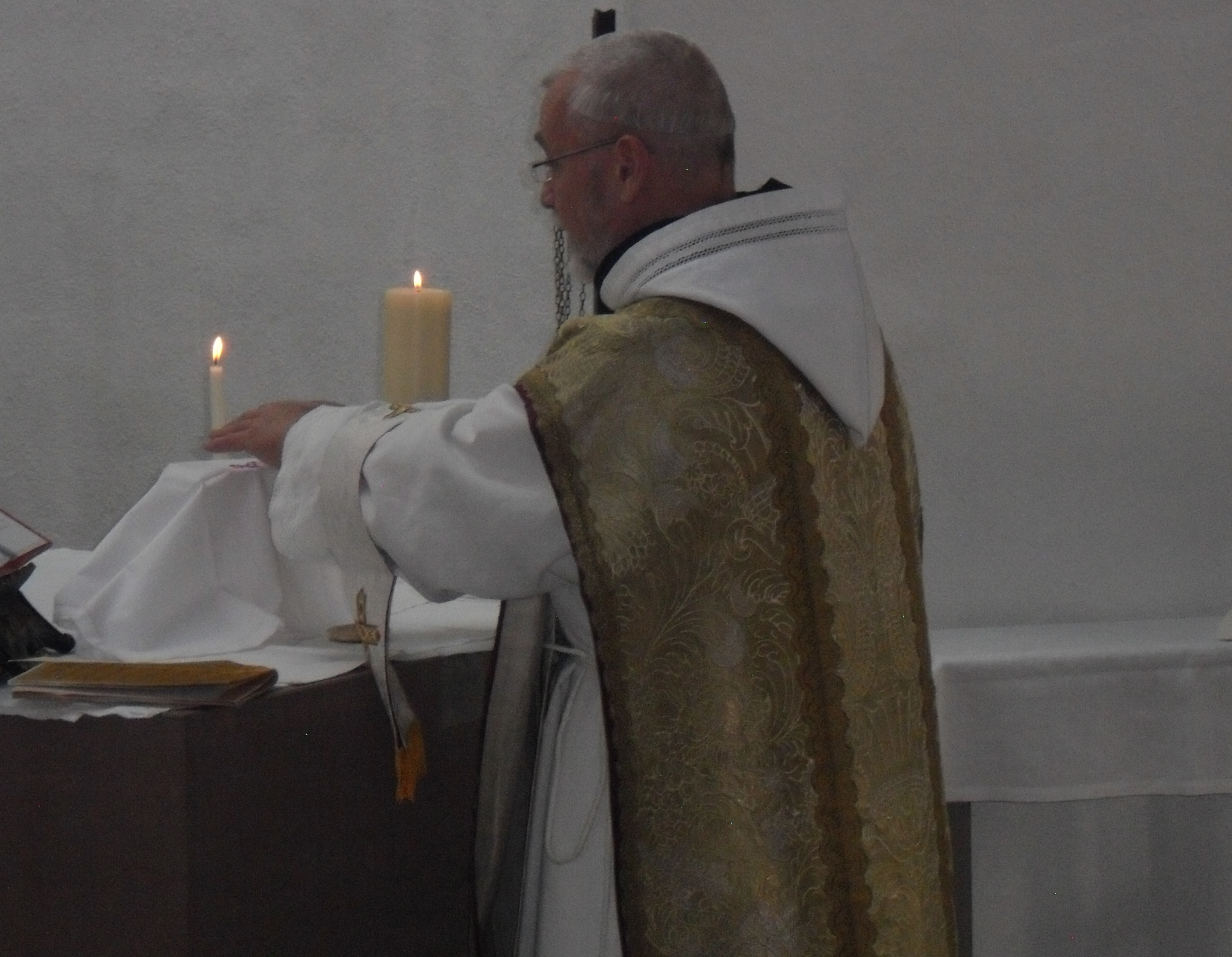 Priester während des Canon am Altar im alten Zisterzienser Ritus